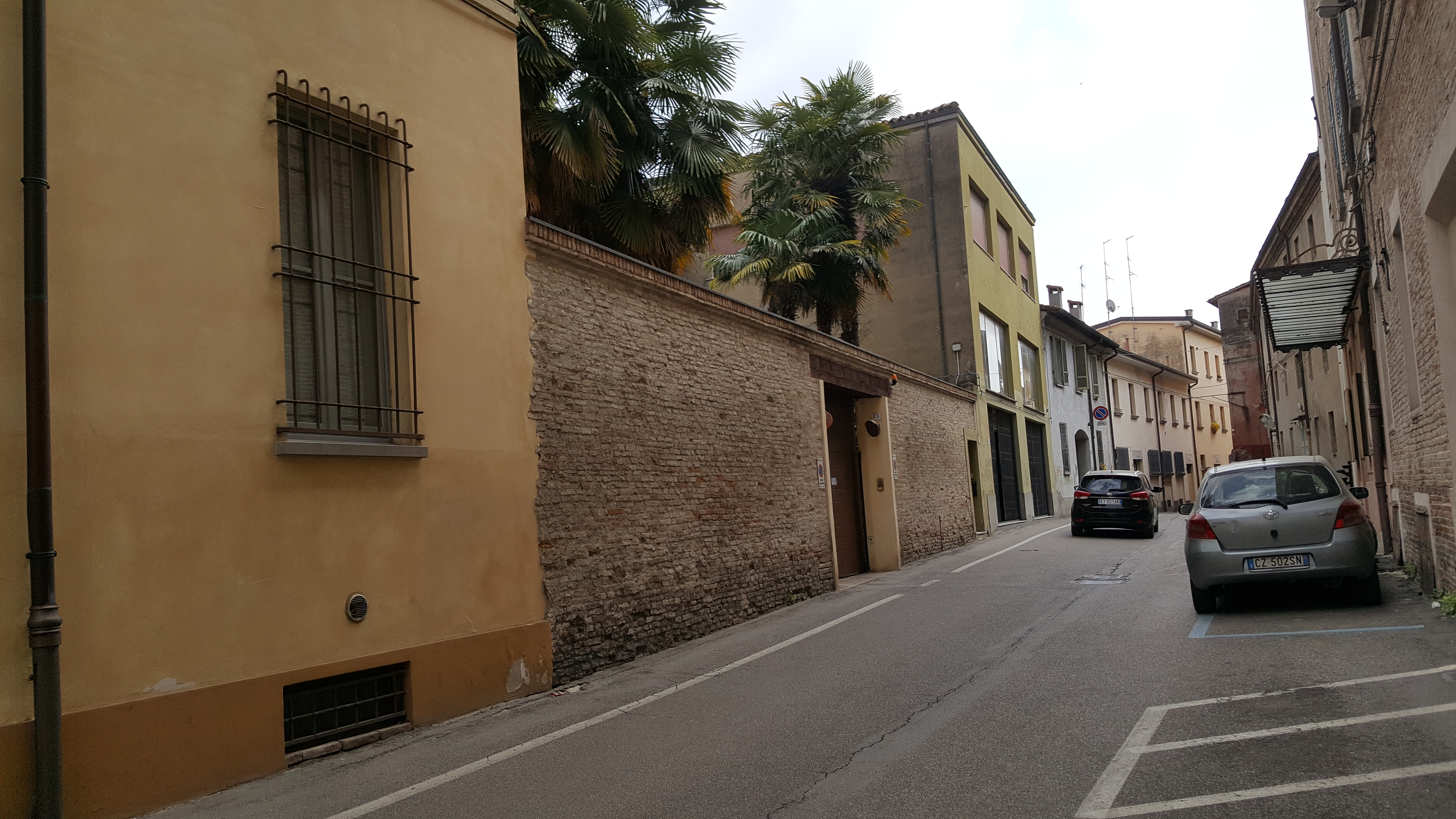 Entrata sulla corte interna di Palazzo Ricciardelli